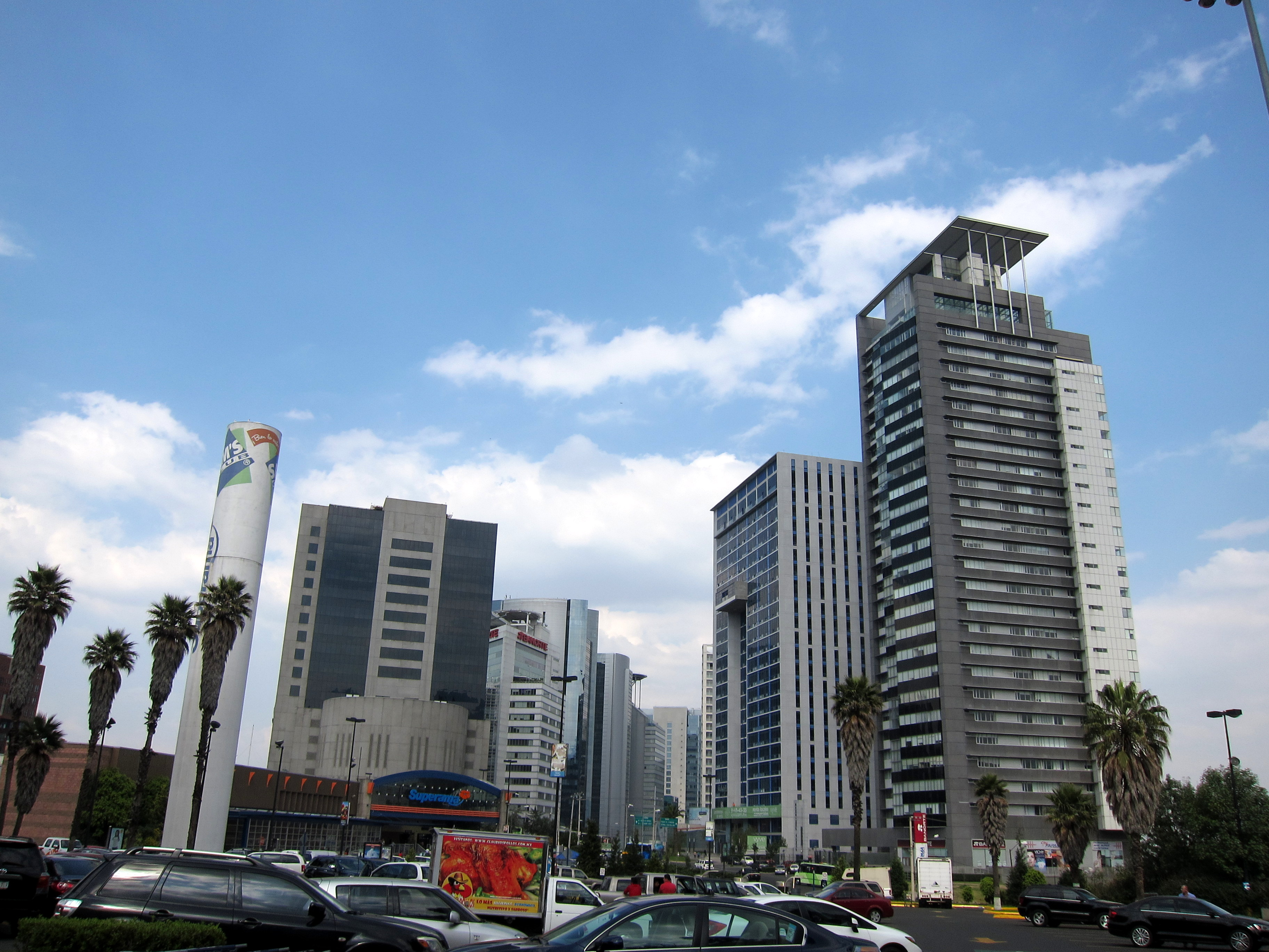 Ciudad de México Distrito Federal DF